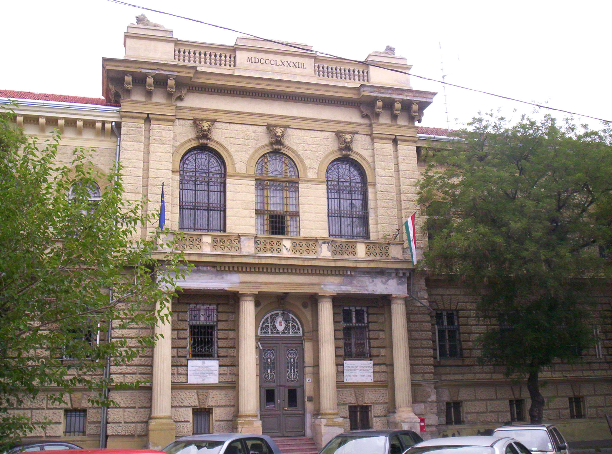 A Szegedi Fegyház és Börtön főépülete – photo taken by uploader User:Csanády in 2006.